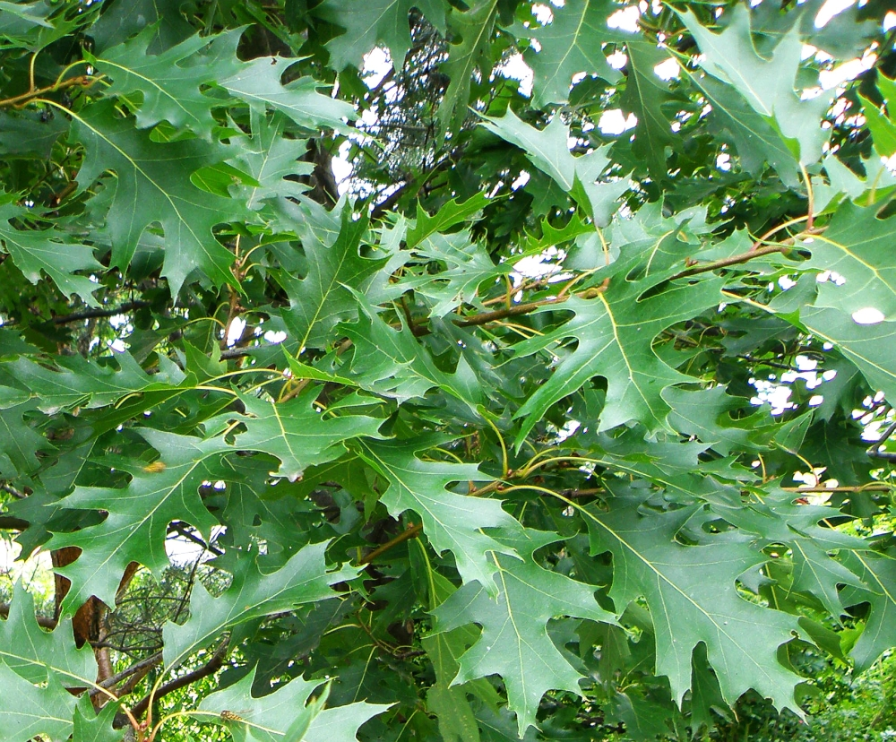 Dąb czerwony (Quercus rubra)